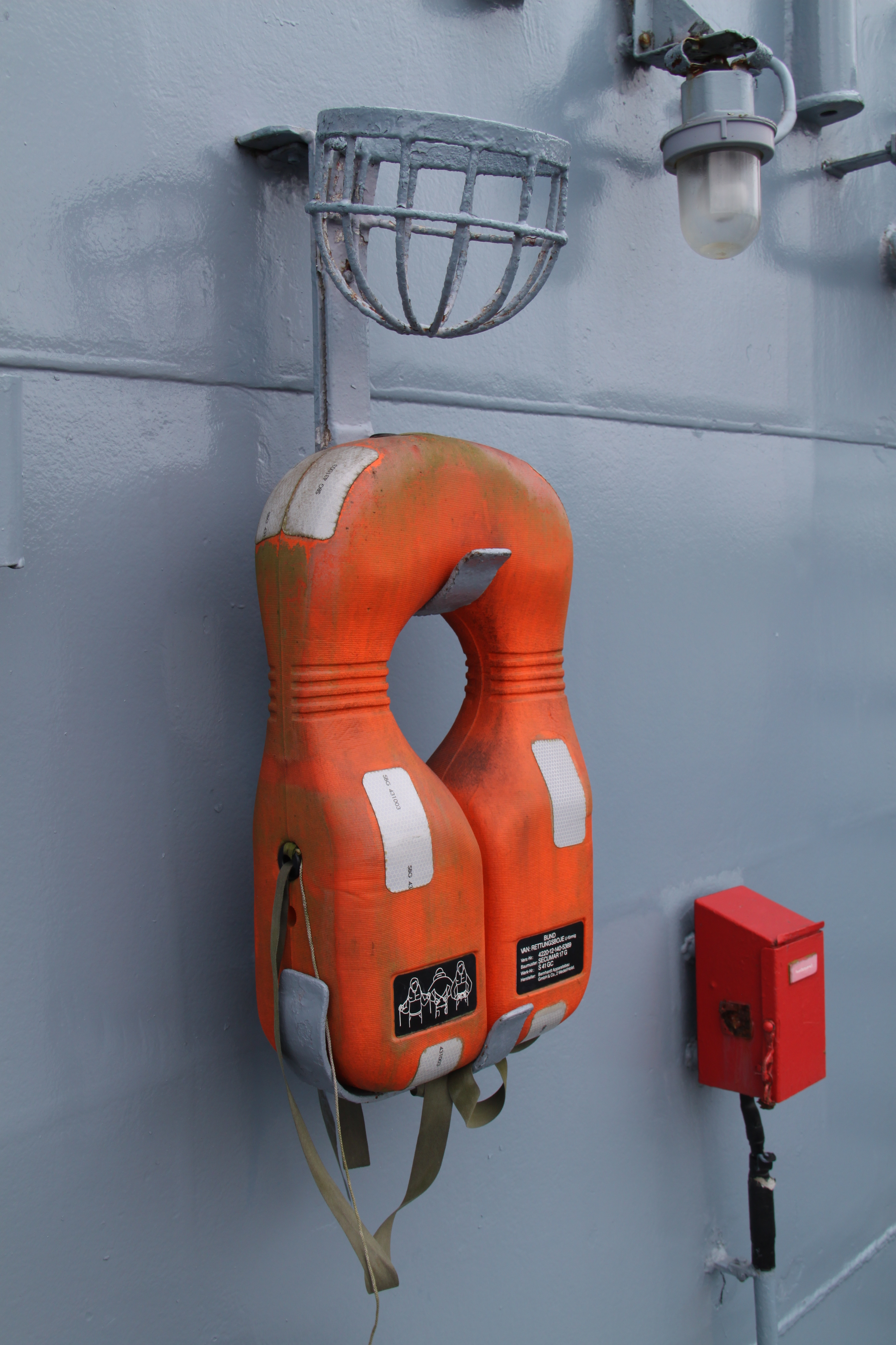 Rettungsweste an Bord des Zerstörer "Mölders" im Deutschen Marinemuseum Wilhelmshaven